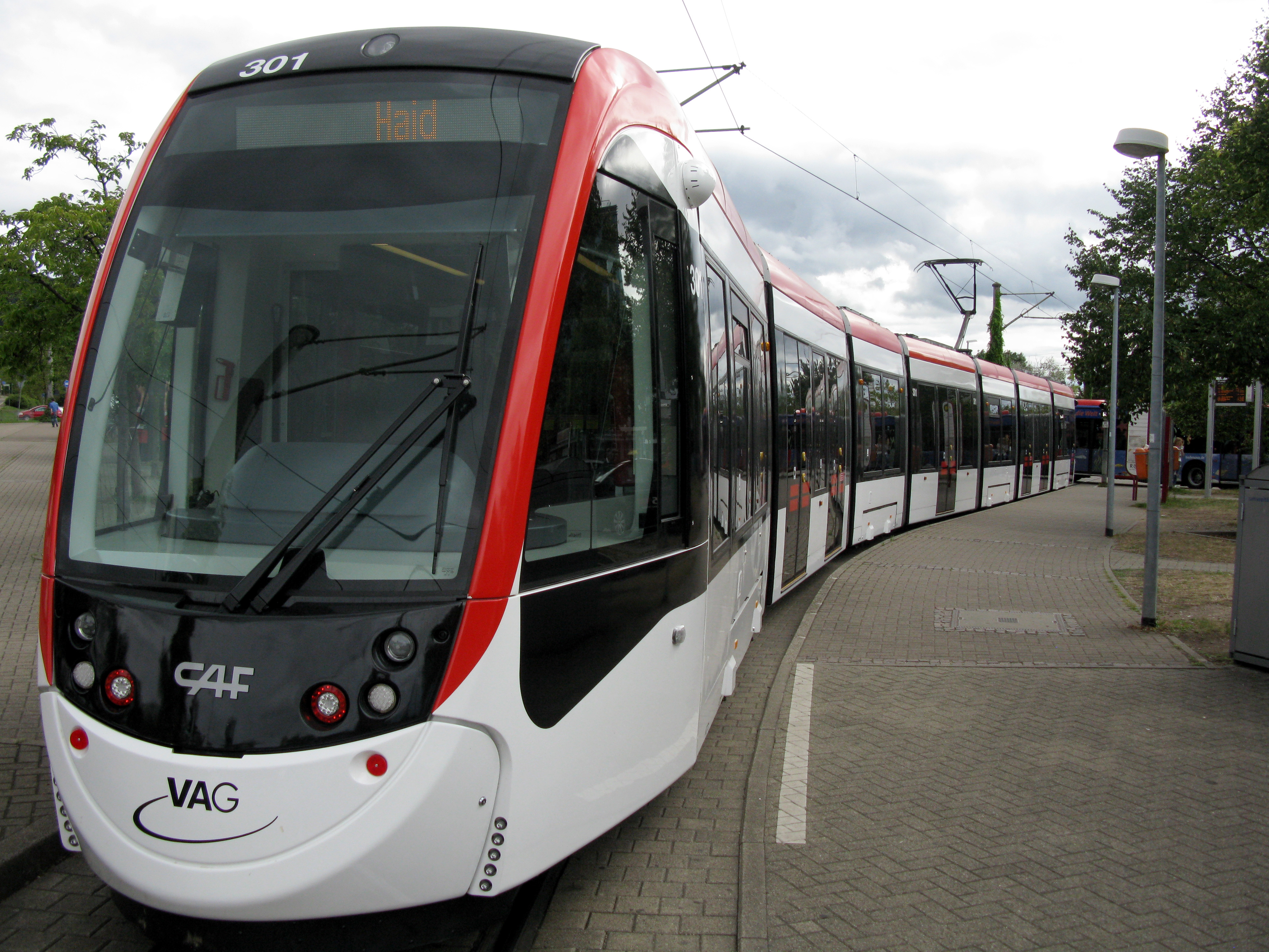 Urbos der Linie 3 an der Endhaltestelle Munzinger Straße in Freiburg-St. Georgen